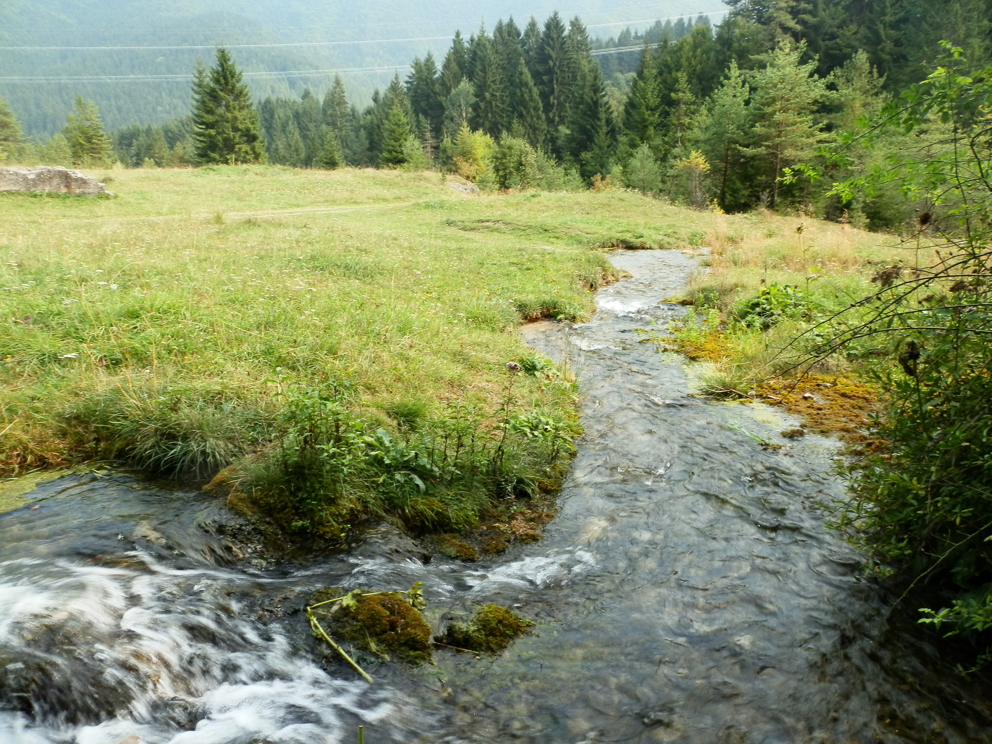 Jazierce- vodný zdroj